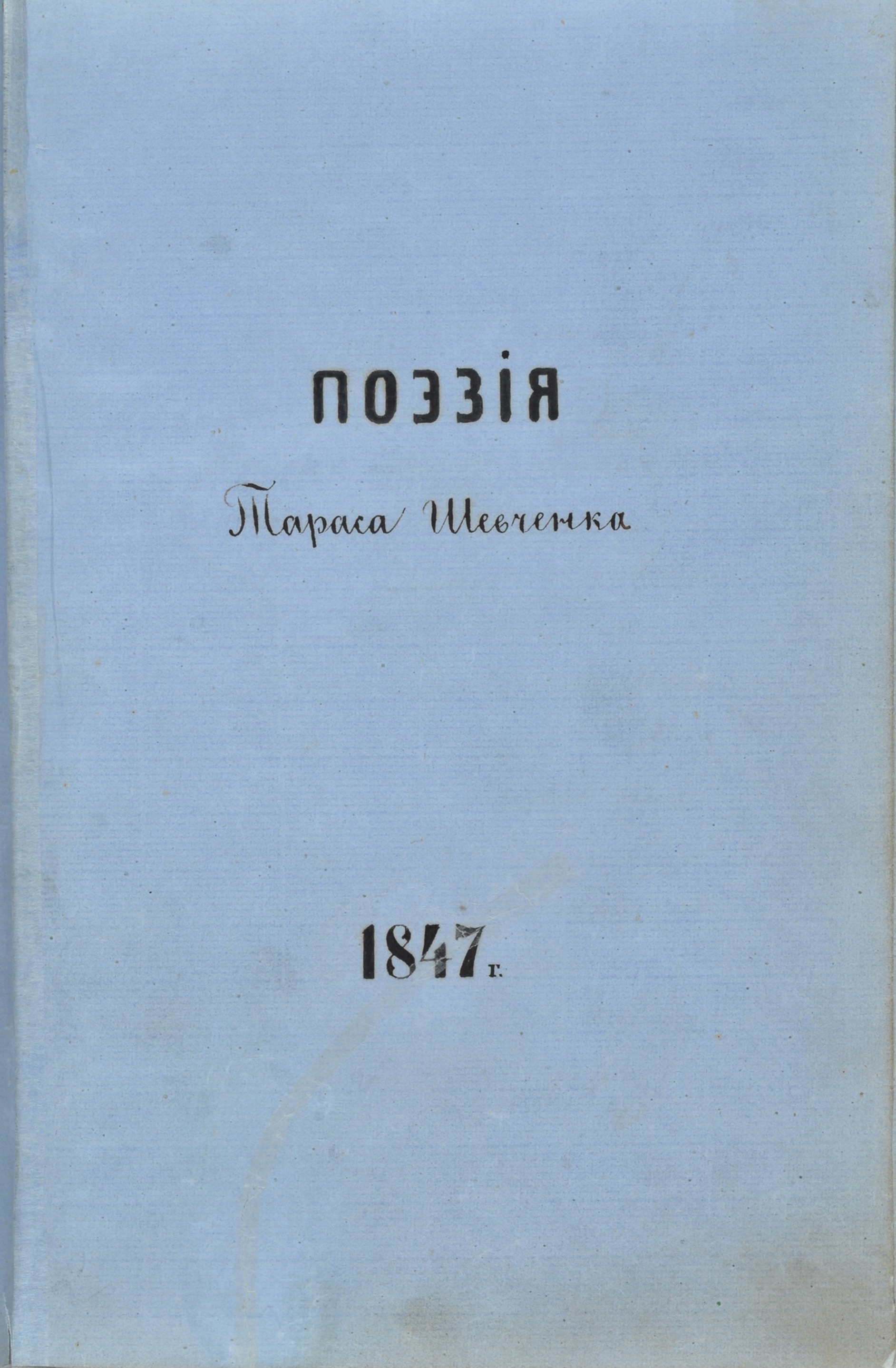 Титульна сторінка збірки «Поезія Тараса Шевченка 1847 р.» у «Більшій Книжці» (1858-1861)